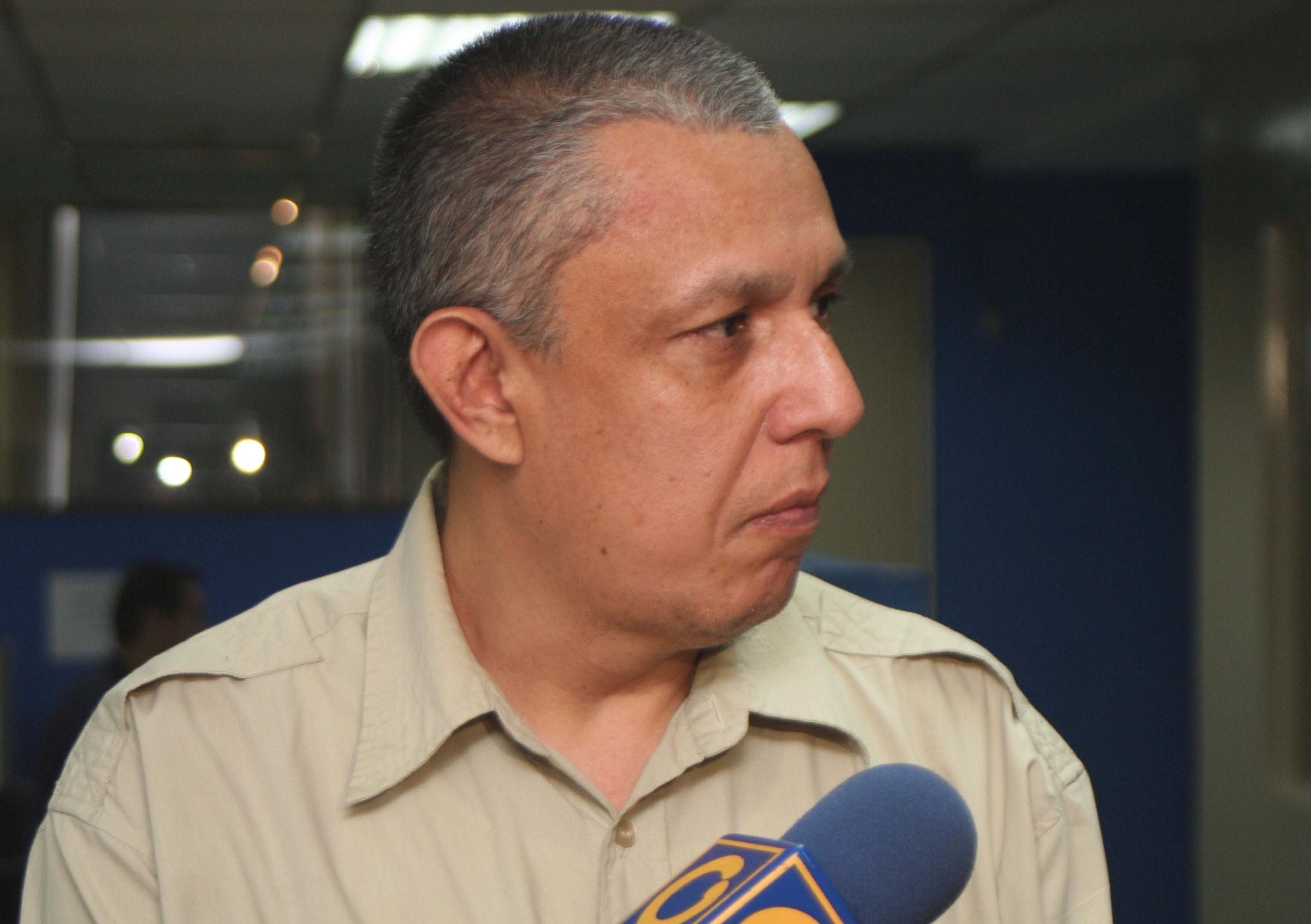 Edgar C. Otálvora declarando a la prensa en Caracas. Noviembre 2009.